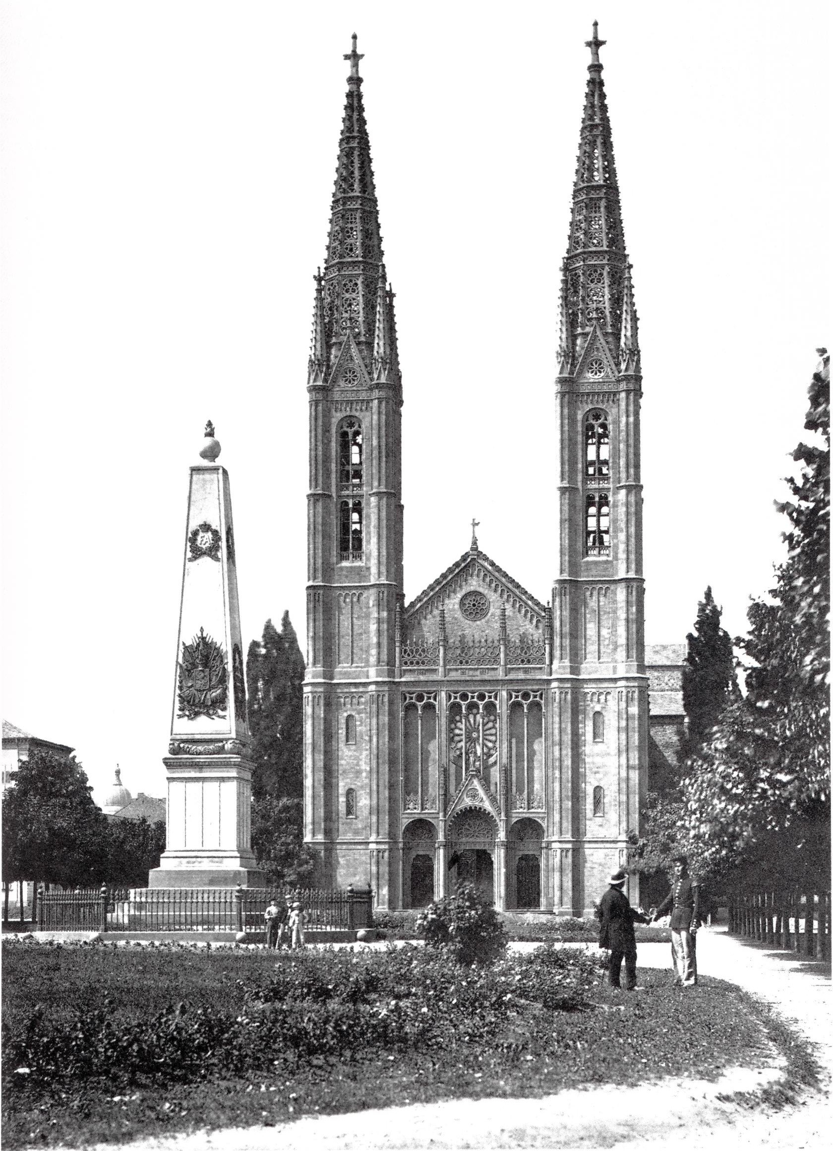 Waterloodenkmal in Wiesbaden. Photographie von 1890